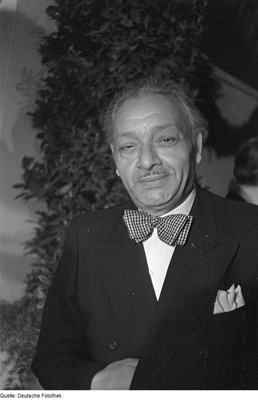 Original image description from the Deutsche Fotothek Porträt: Dirigent Boulanger